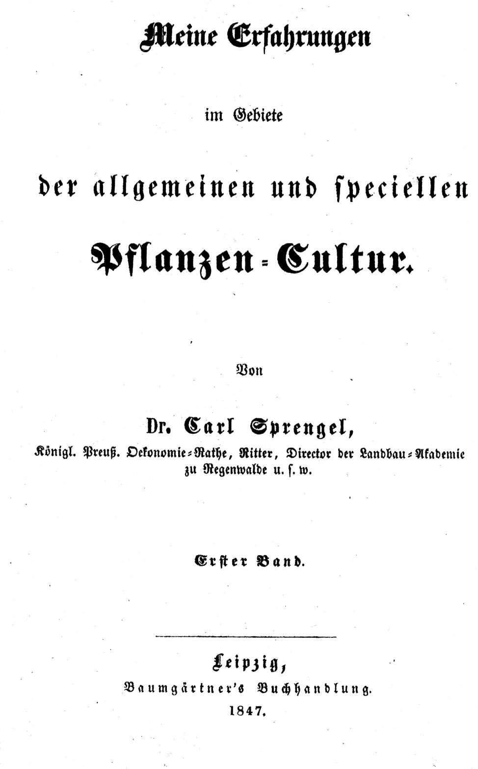 Titelblatt von Carl Sprengels Werk Meine Erfahrungen im Gebiete der allgemeinen und speciellen Pflanzen-Cultur, Leipzig: Baumgärtner 1847